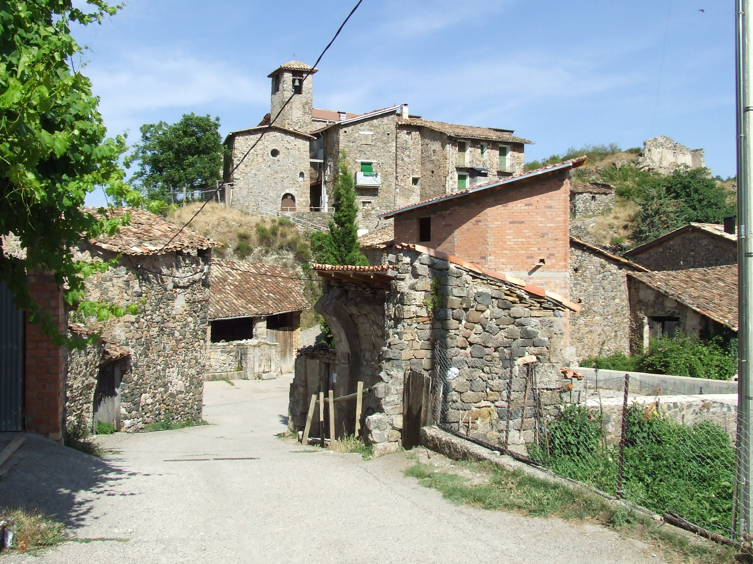 El que queda de Sant Miquel de Naens (Senterada, Pallars Jussà)